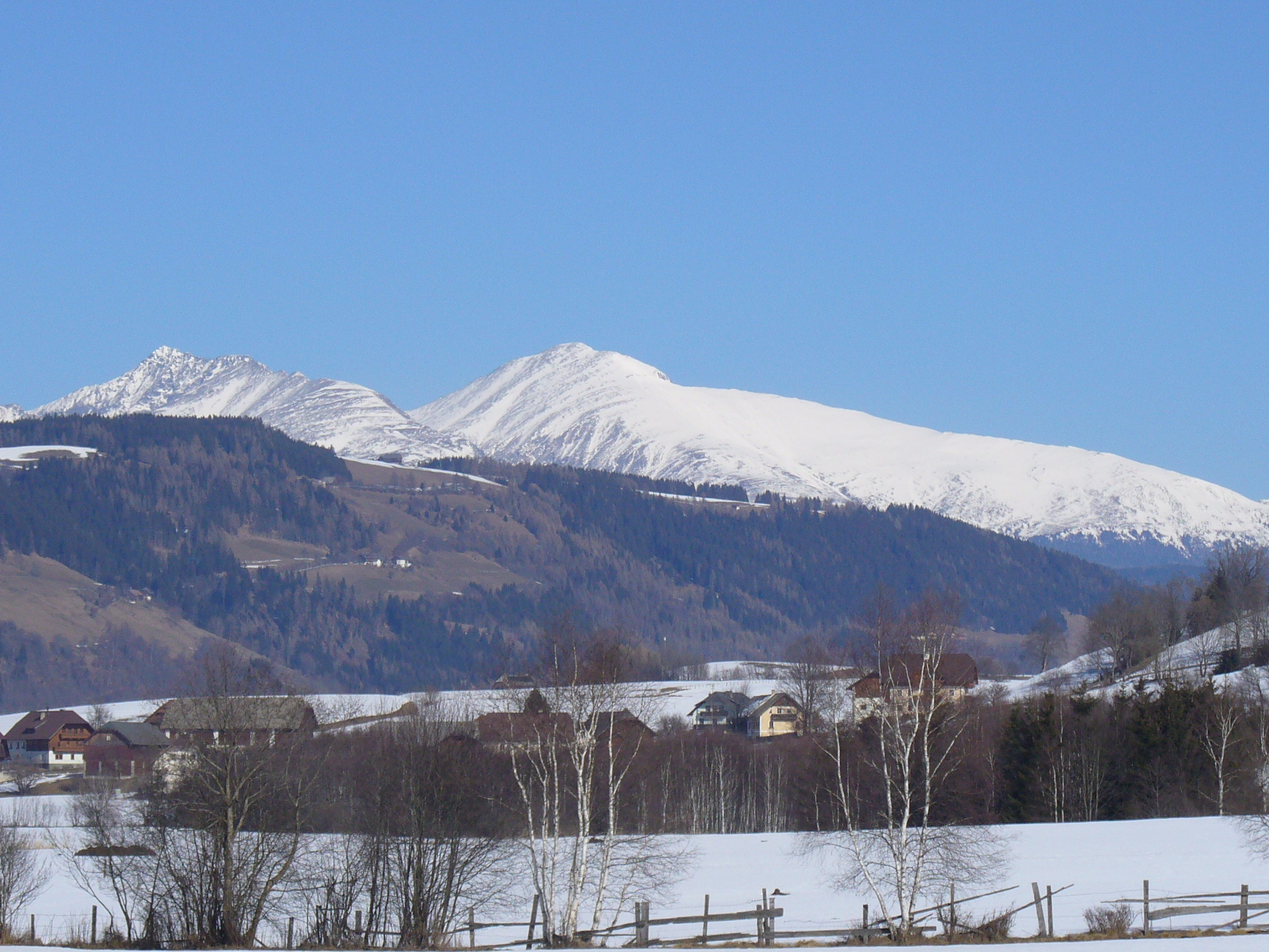 Lungauer Becken mit Preber